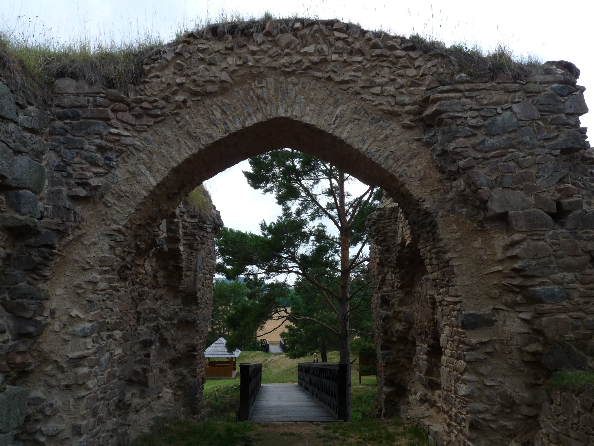 Zřícenina hradu Vrškamýk, Z od Kamýku, Kamýk nad Vltavou